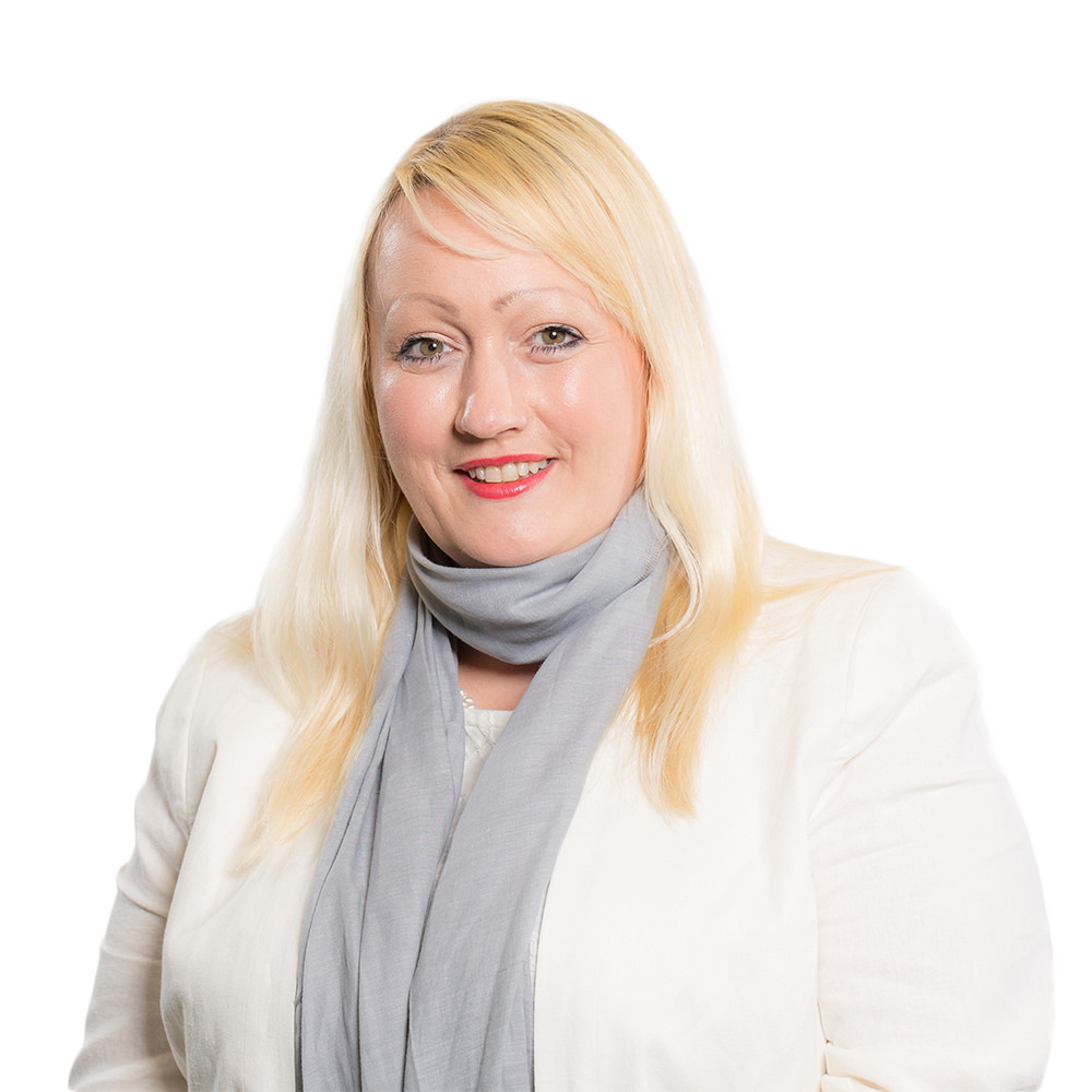 Plaid: Llafur Cymru Etholaeth: Gwyr Party: Welsh Labour Constituency: Gower